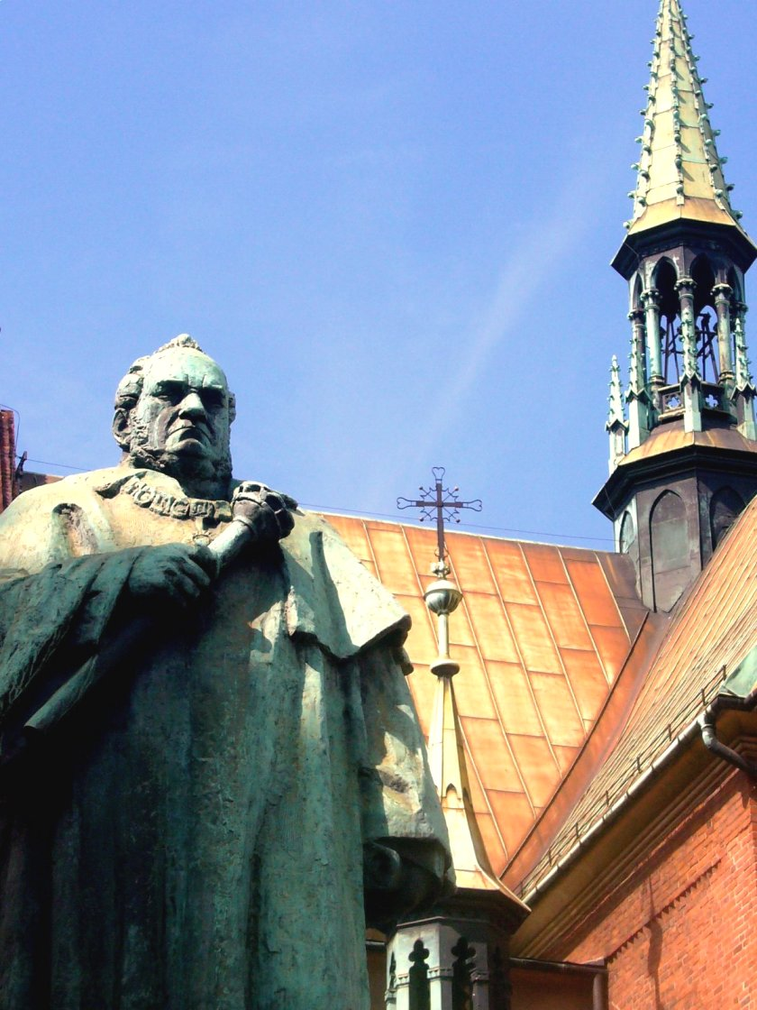 Pomnik Józefa Dietla przed krakowskim magistratem